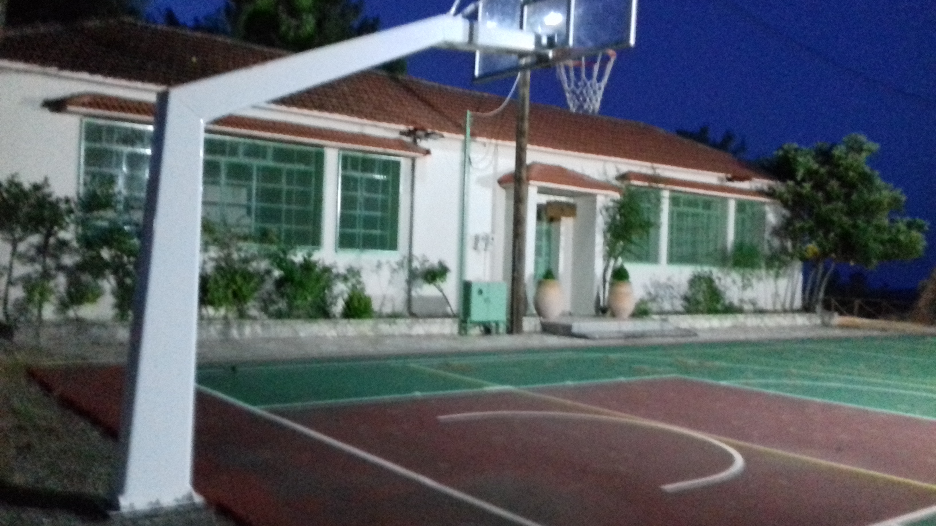 Ο χώρος της Σχολής Καρυτσιώτη, στον Άγιο Ιωάννη Αρκαδίας Αδειοδότηση Το παραπάνω αρχείο διανέμεται υπό τις δύο παρακάτω άδειες χρήσης. Μπορείτε να επιλέξετε την άδεια της προτίμησής σας.